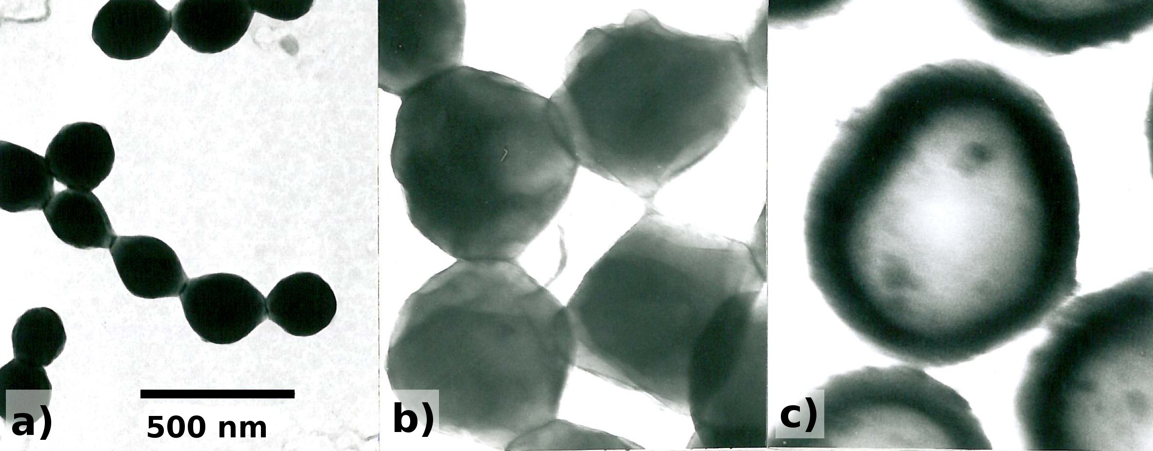 TEM-Aufnahmen der Herstellungsschritte von Hohllatices durch Aufquellen mehrphasiger Latexpartikel, Rutheniumkontrastierung